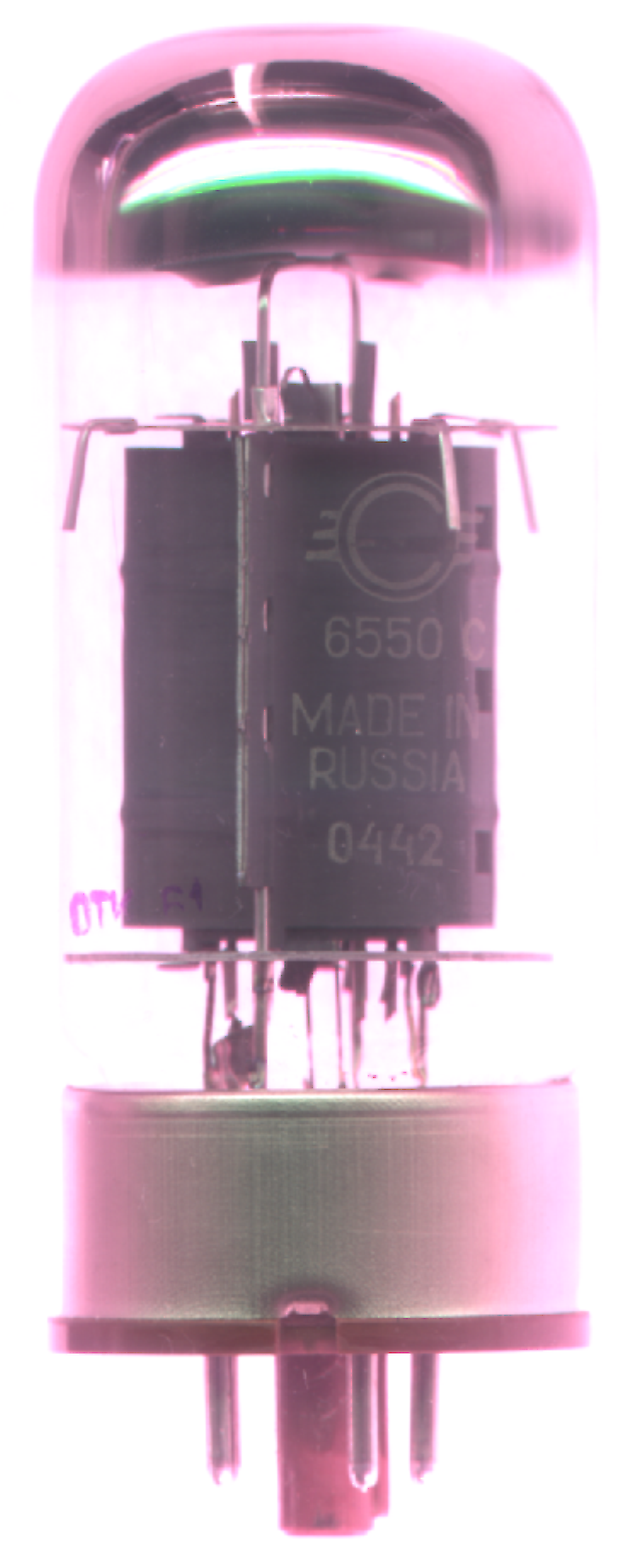 Tube 6550C de marque SED/Svetlana Photo personnelle. Catégorie:Tube électronique